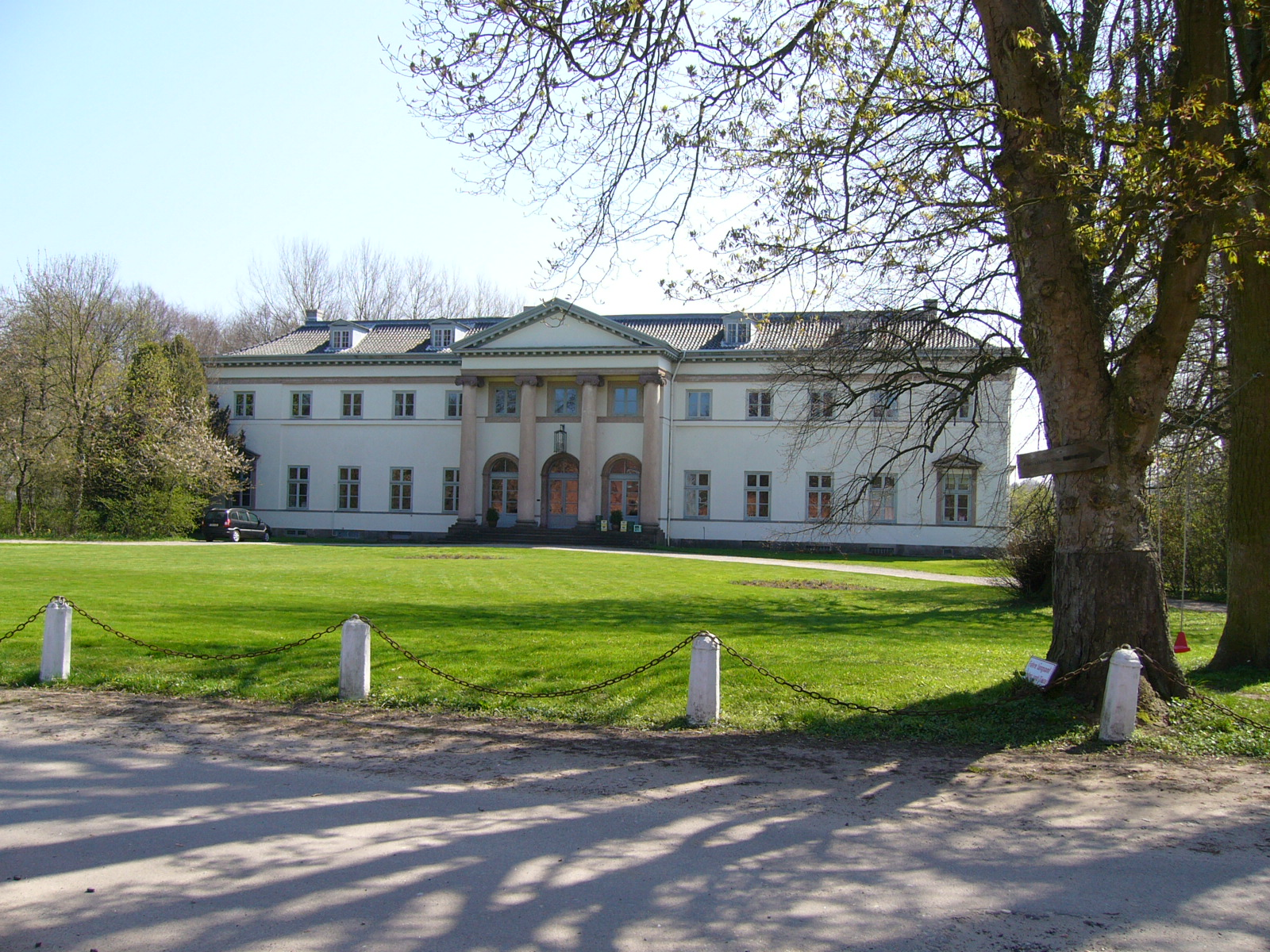 Herrenhaus des Gutes Knoop (1791/96). Dieser bedeutende Bau des Klassizismus wurde von Axel Bundsen gebaut. Bauherr war Graf Heinrich Friedrich Baudissin, der Caroline Schimmelmann, Tochter des damals wohl reichsten Mannes Dänemarks, geheiratet hatte.